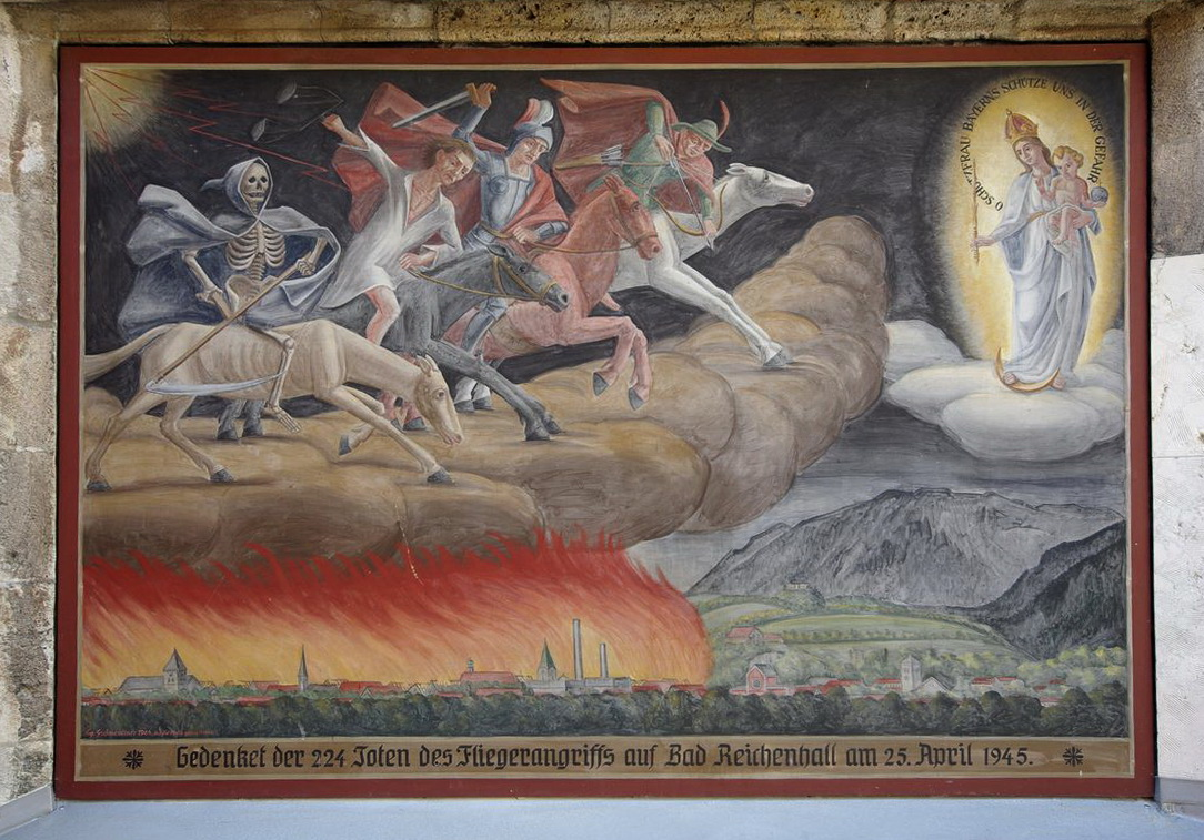 Gemälde auf der Rückseite der St. Ägidikirche in Bad Reichenhall, Georg Gschwendtner, 1964. „Apokalyptische Reiter toben über der Tallandschaft (gemäß der Offenbarung des Johannes sinnbildlich stehend für Tod, Pest, Krieg und Hungersnot) und bringen der Stadt Tod und Verderben.“ Anm: die Opferzahl am Gemälde war ursprünglich 250, wurde aber in jüngerer Vergangenheit auf die 224 Toten korrigiert.